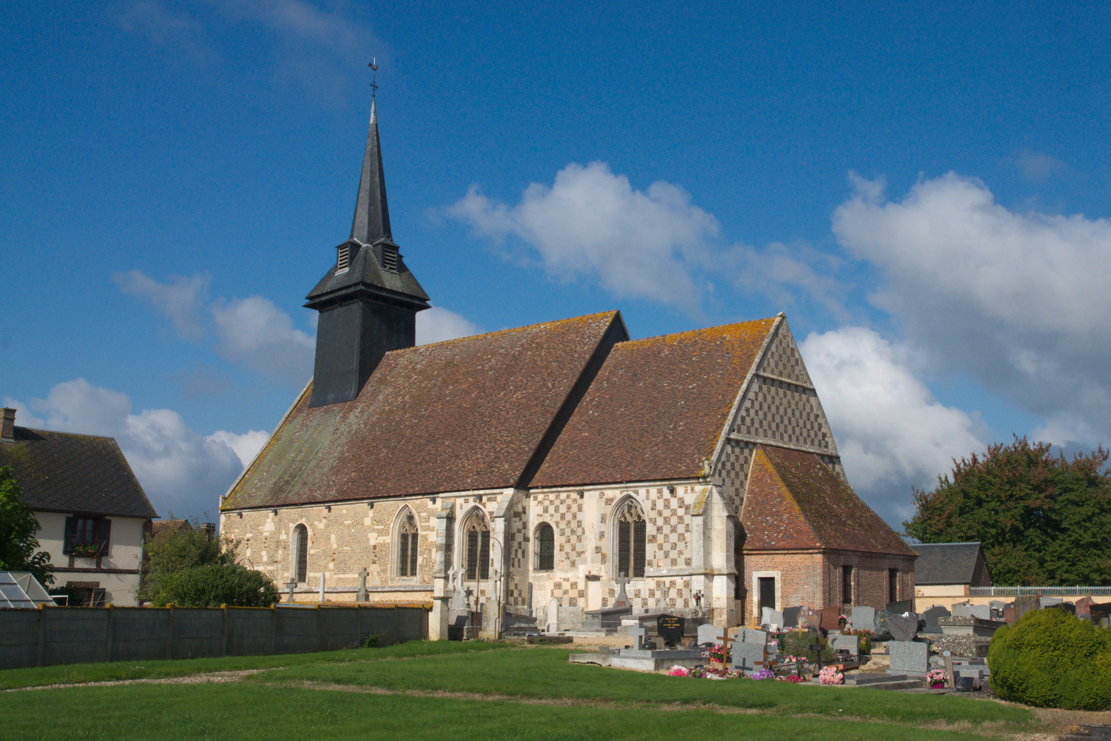 Église Sainte-Marguerite de Sainte-Marguerite-de-l'Autel .